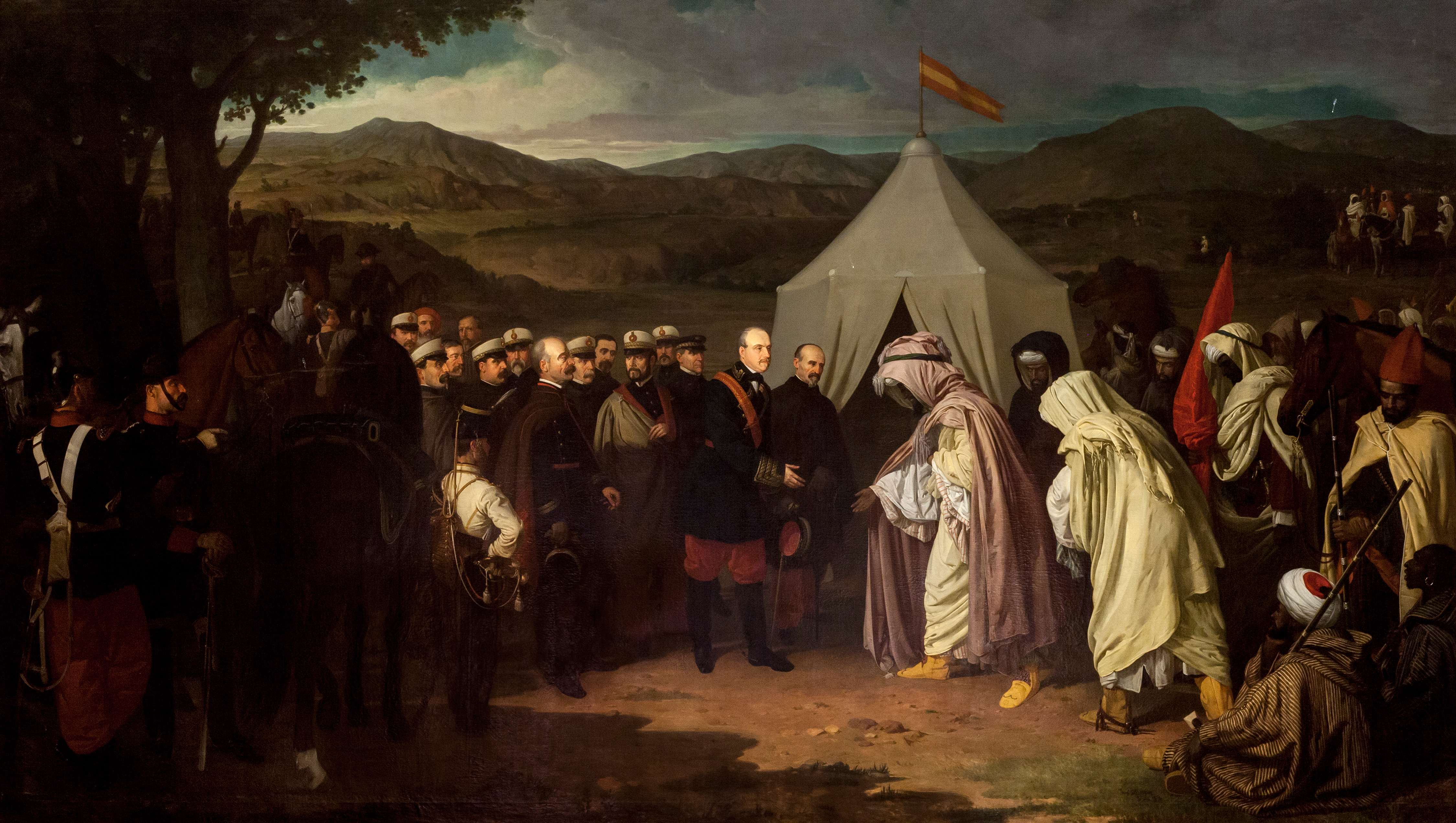 La obra representa la firma del Tratado de Wad-Ras, que fue suscrito por España y Marruecos el día 23 de marzo de 1860, y fue adquirido por el Ayuntamiento de Sevilla en 1872.